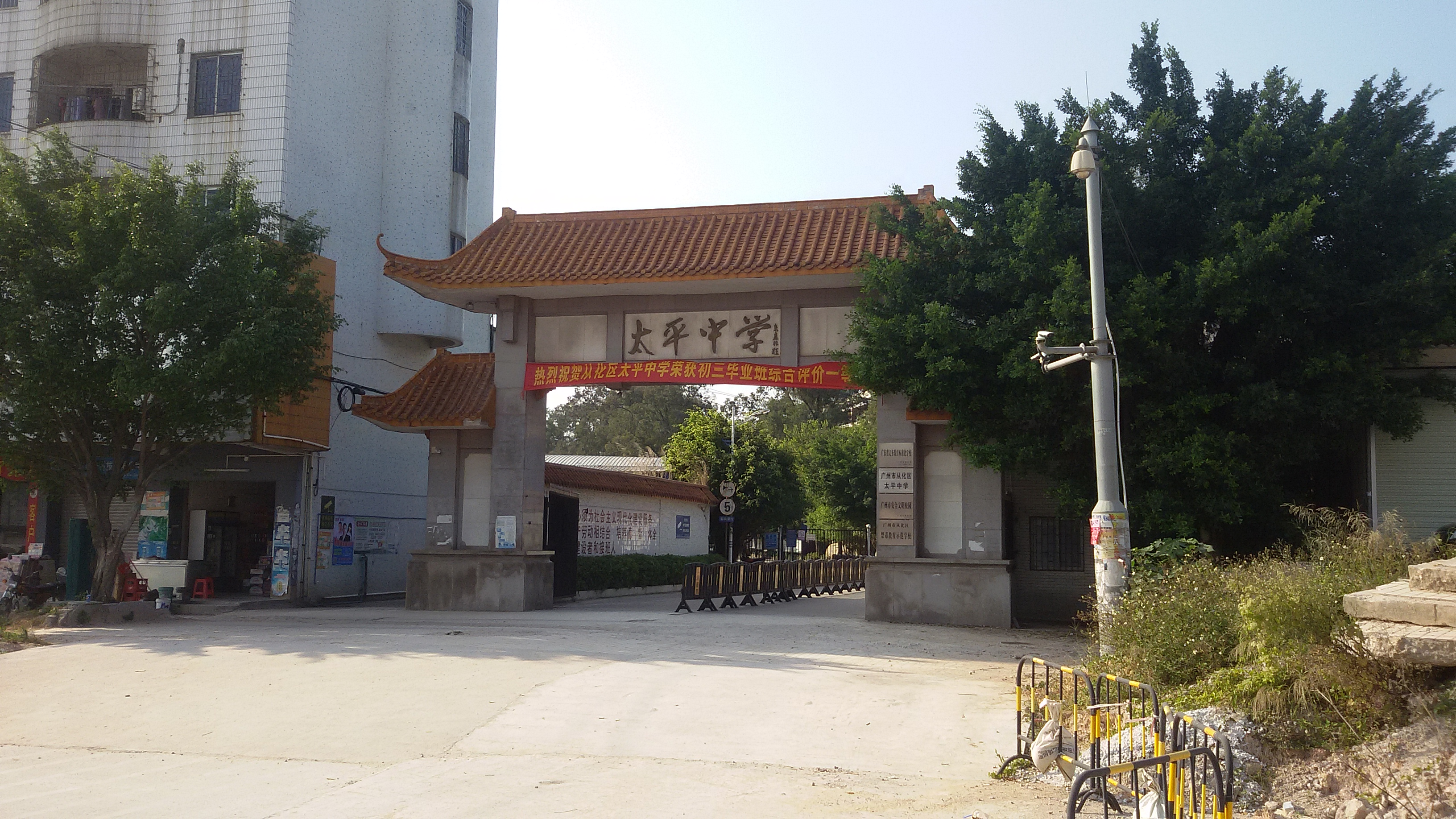 粵語: 从化太平中学嘅大门口